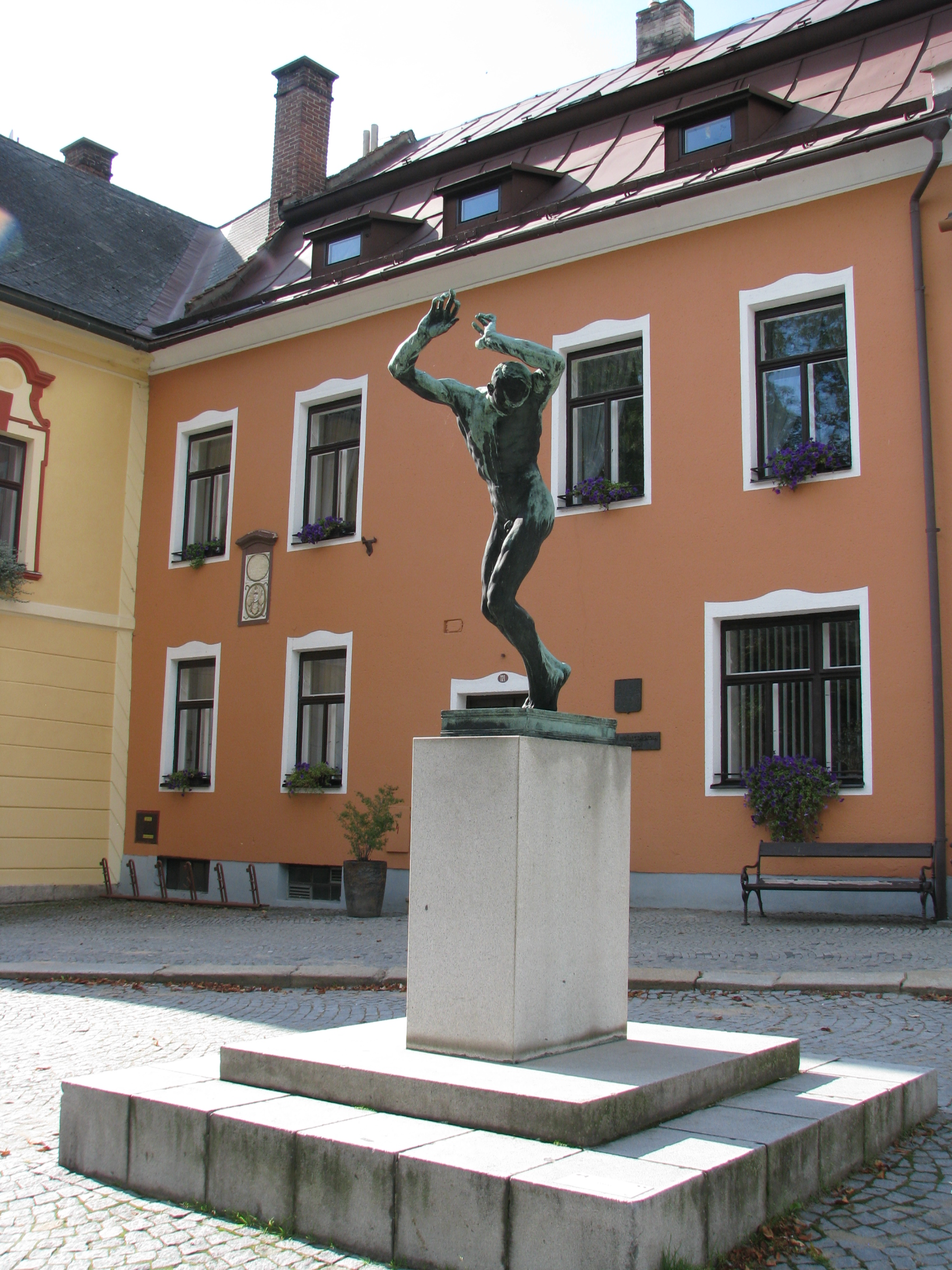 Socha Raněný, Vratislavovo náměstí, Nové Město na Moravě